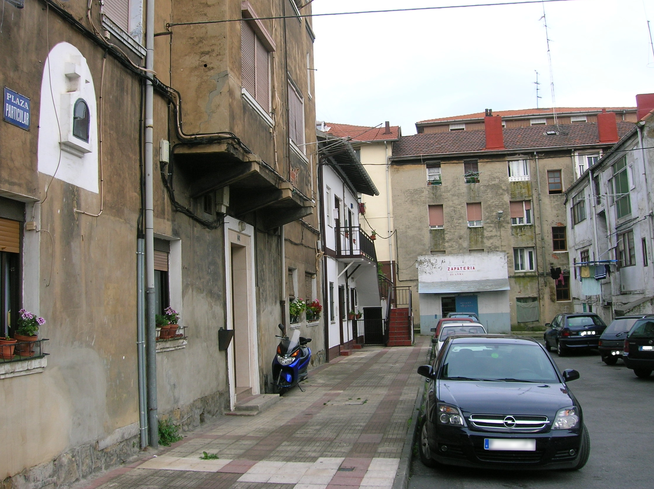 Plaza particular en Lamiako, como se veía en 2007. Posteriormente estos edificios han sido demolidos.